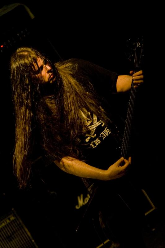 Cannibal Corpse Live @ Santana Hall - 21/02/2010 - São Paulo, Brasil É proibida a cópia ou reprodução deste material sem a autorização do autor. Por favor, não publique nada daqui sem o devido crédito. Fotógrafo: Alexandre Cardoso